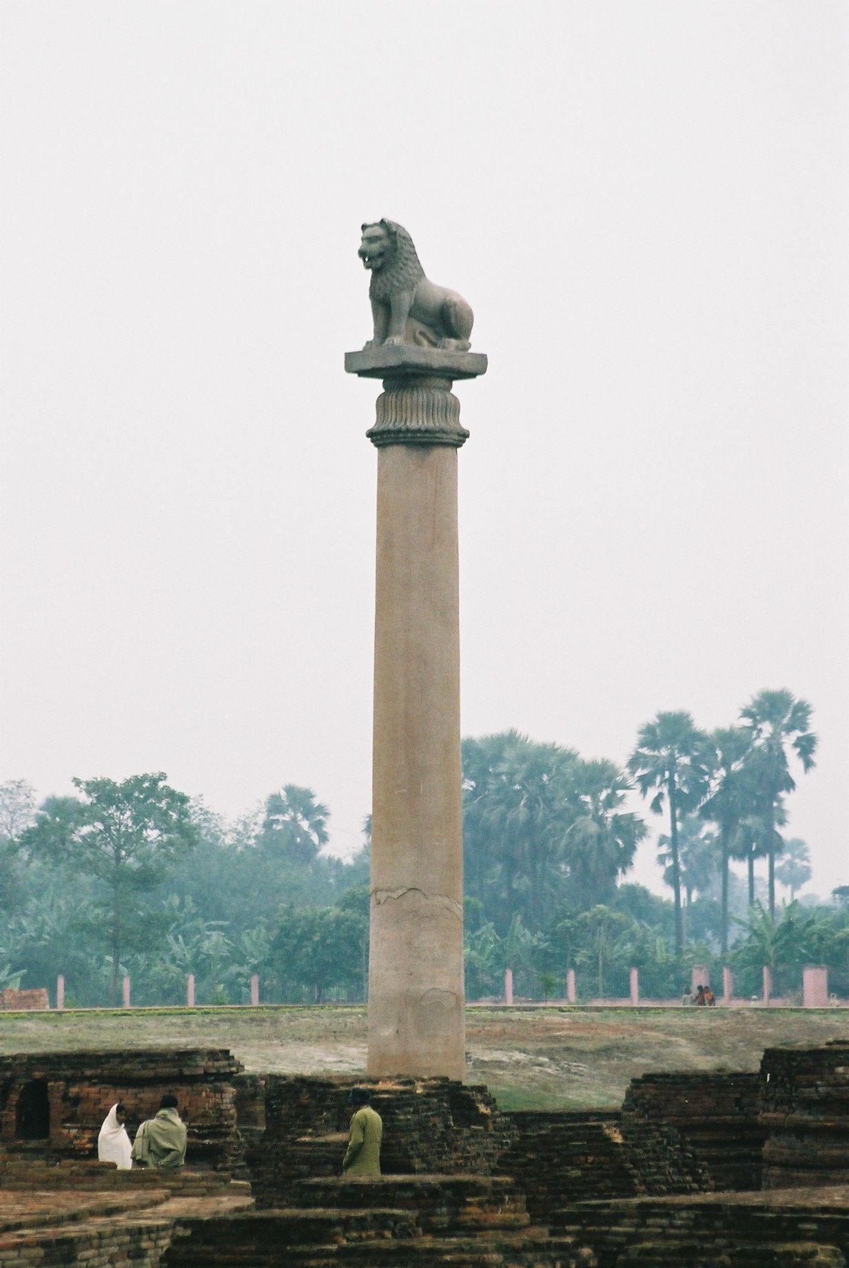 土の中に埋まっていた為に、完全な形で残っているアショーカ王柱。 これだけ完全な形で残っているのはインドでもヴァイシャーリーくらいとのこと。 (2005/01/24 Vaishali, Bihar, INDIA)